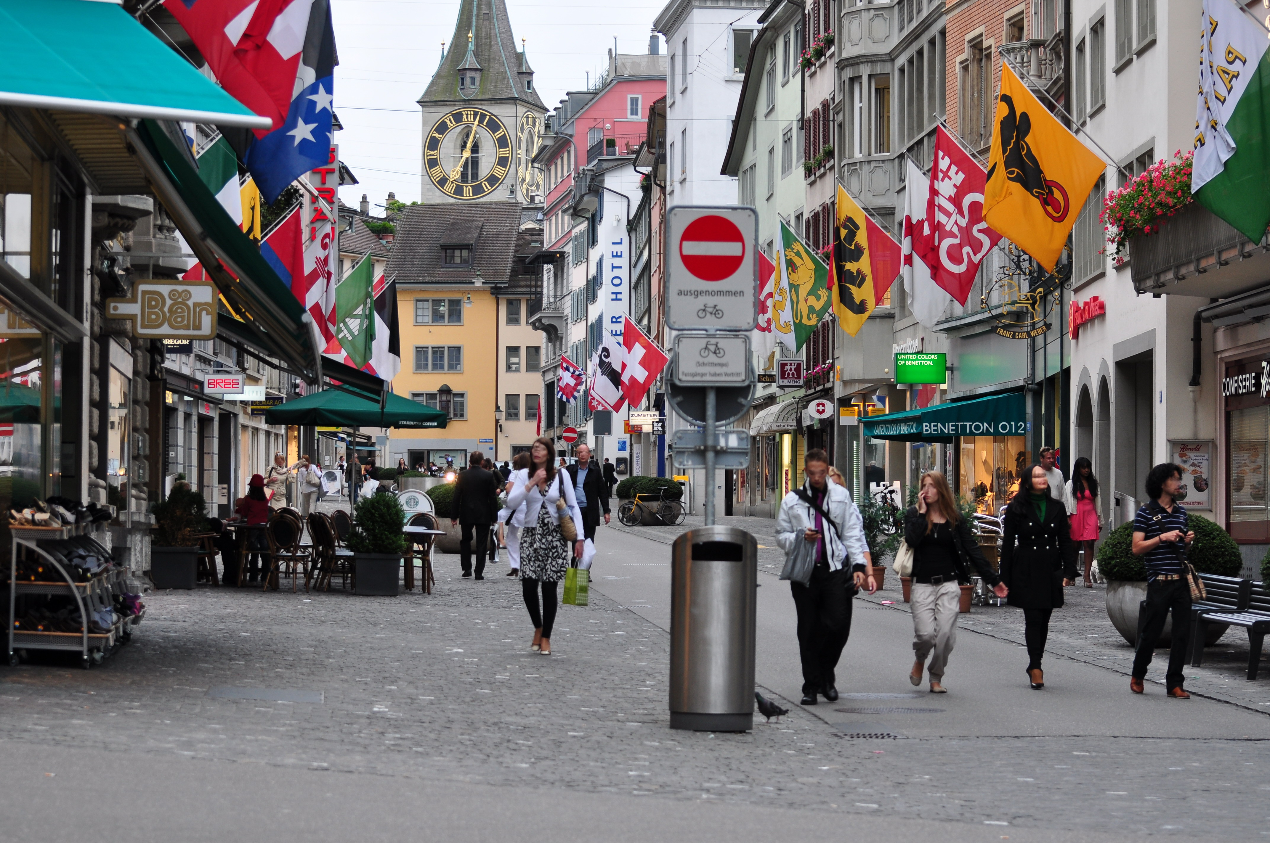 Rennweg in Zürich (Switzerland)